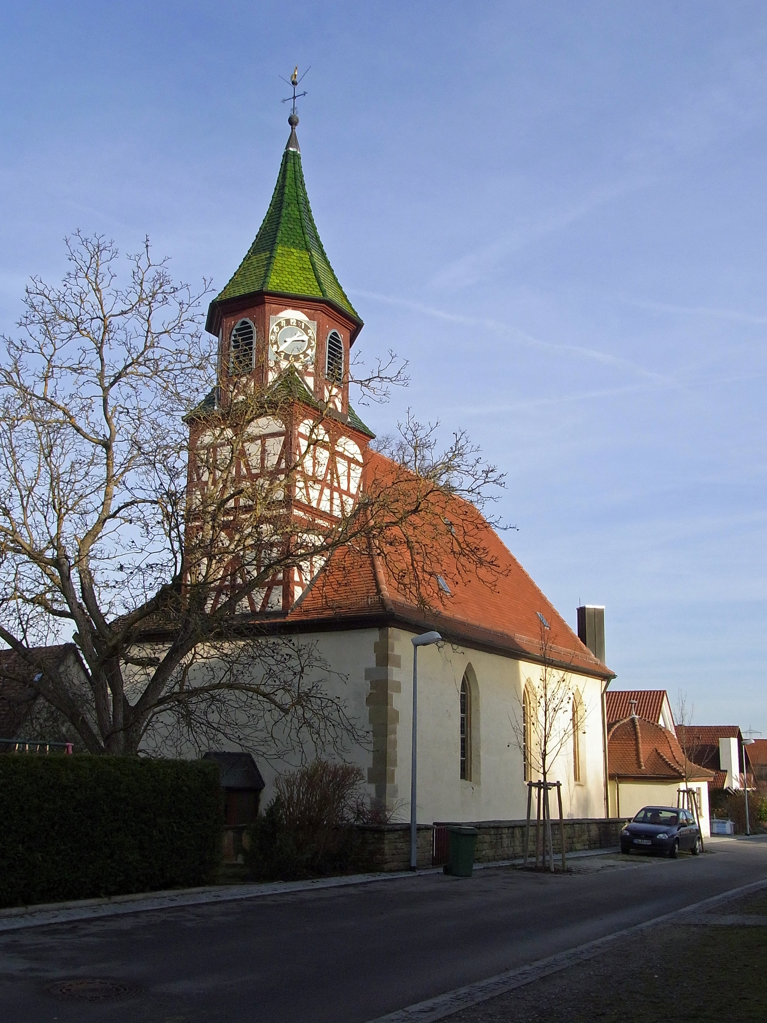 Ammerbuch-Pfäffingen: Michaelskirche